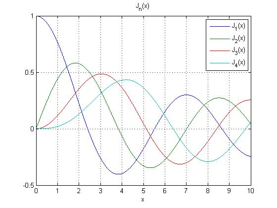 Bessel functions